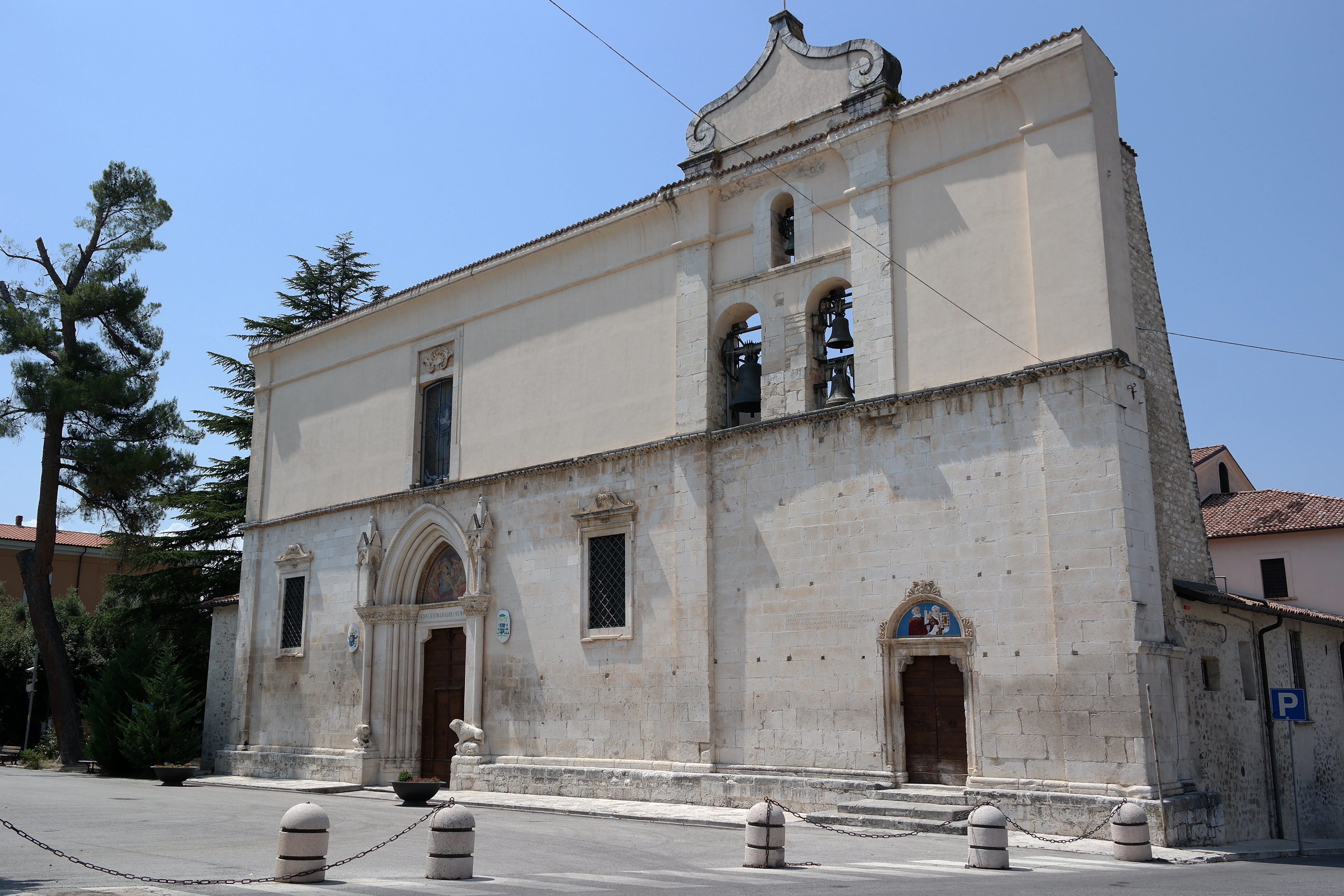 Cattedrale di San Panfilo a Sulmona